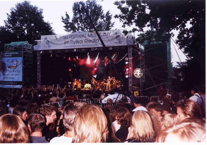 V Festiwal Muzyczny im Ryska Riedla w Tychach